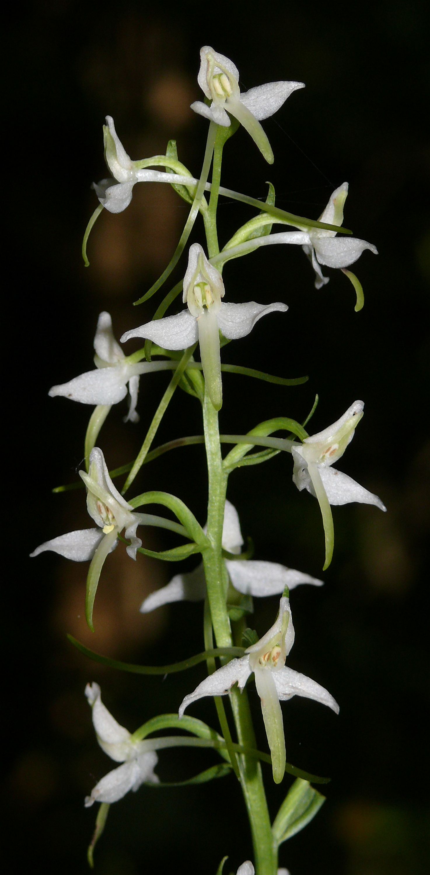 Platanthera bifoliaGermany - Schwäbisch-Fränkische Waldberge